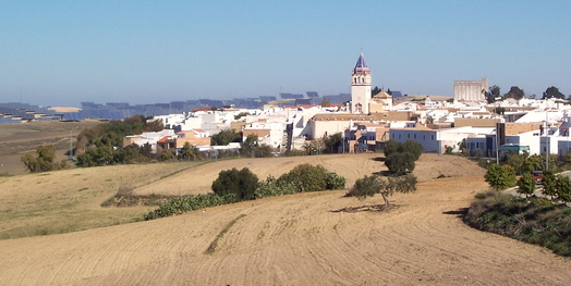 Panorámica de El Coronil (Sevilla, España)